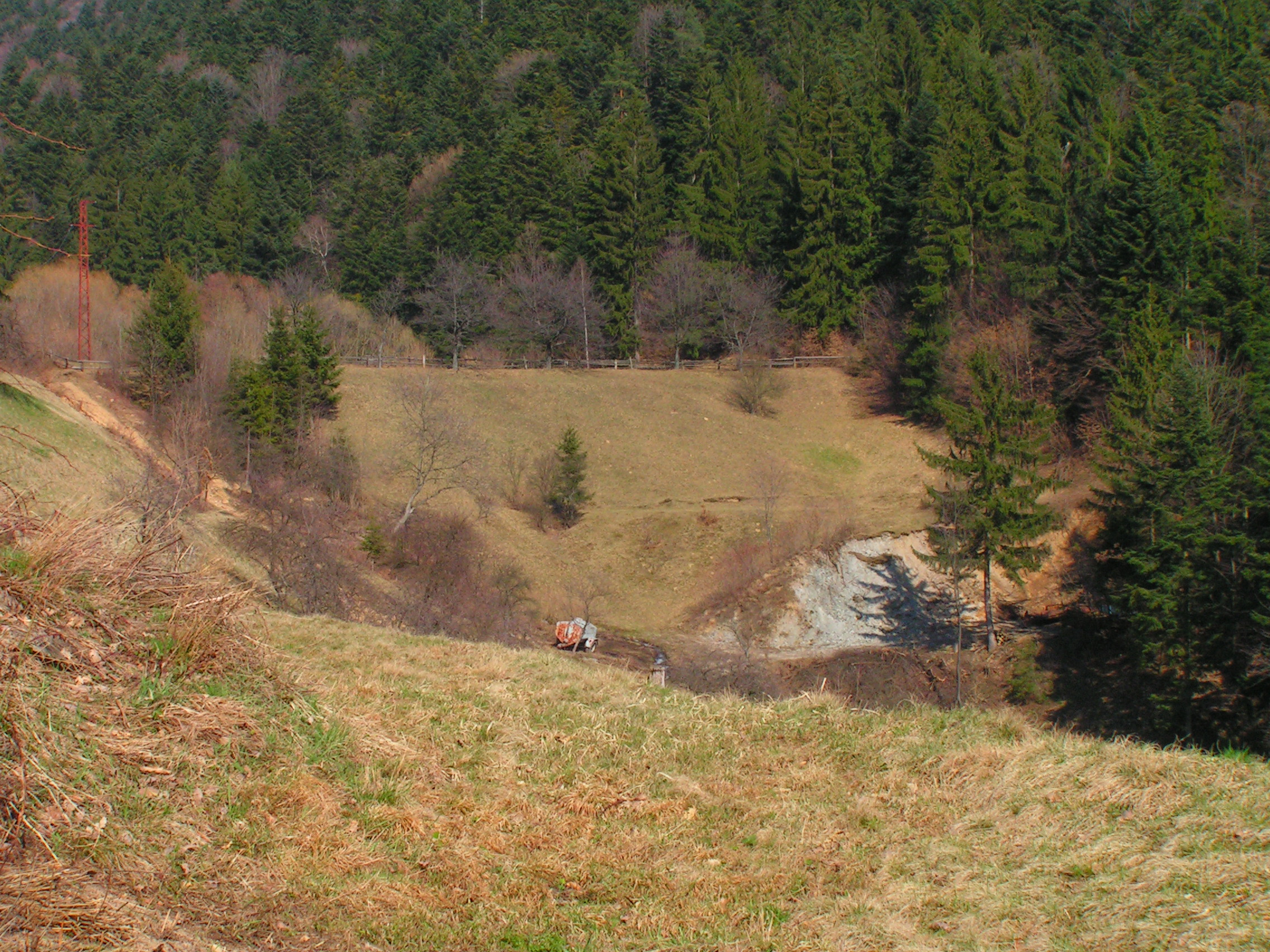 Brennerský tajch pohľad na vzdušnú stranu hrádze